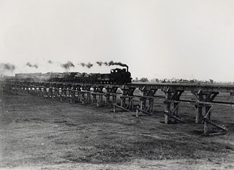 Luodong-Waldbahn